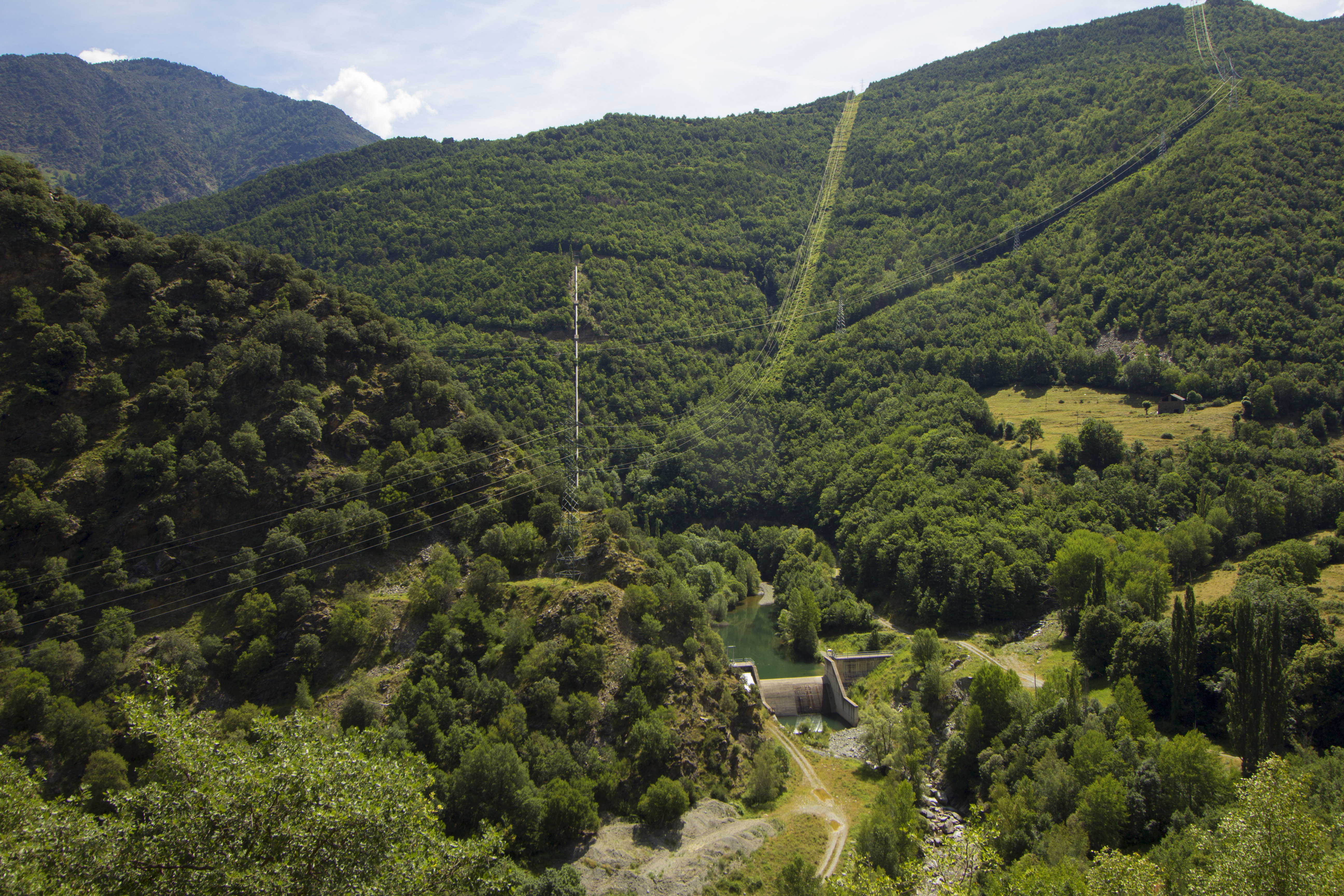 Resclosa de la central hidroelèctrica de Mal Pas, Llavorsí (Pallars Sobirà)